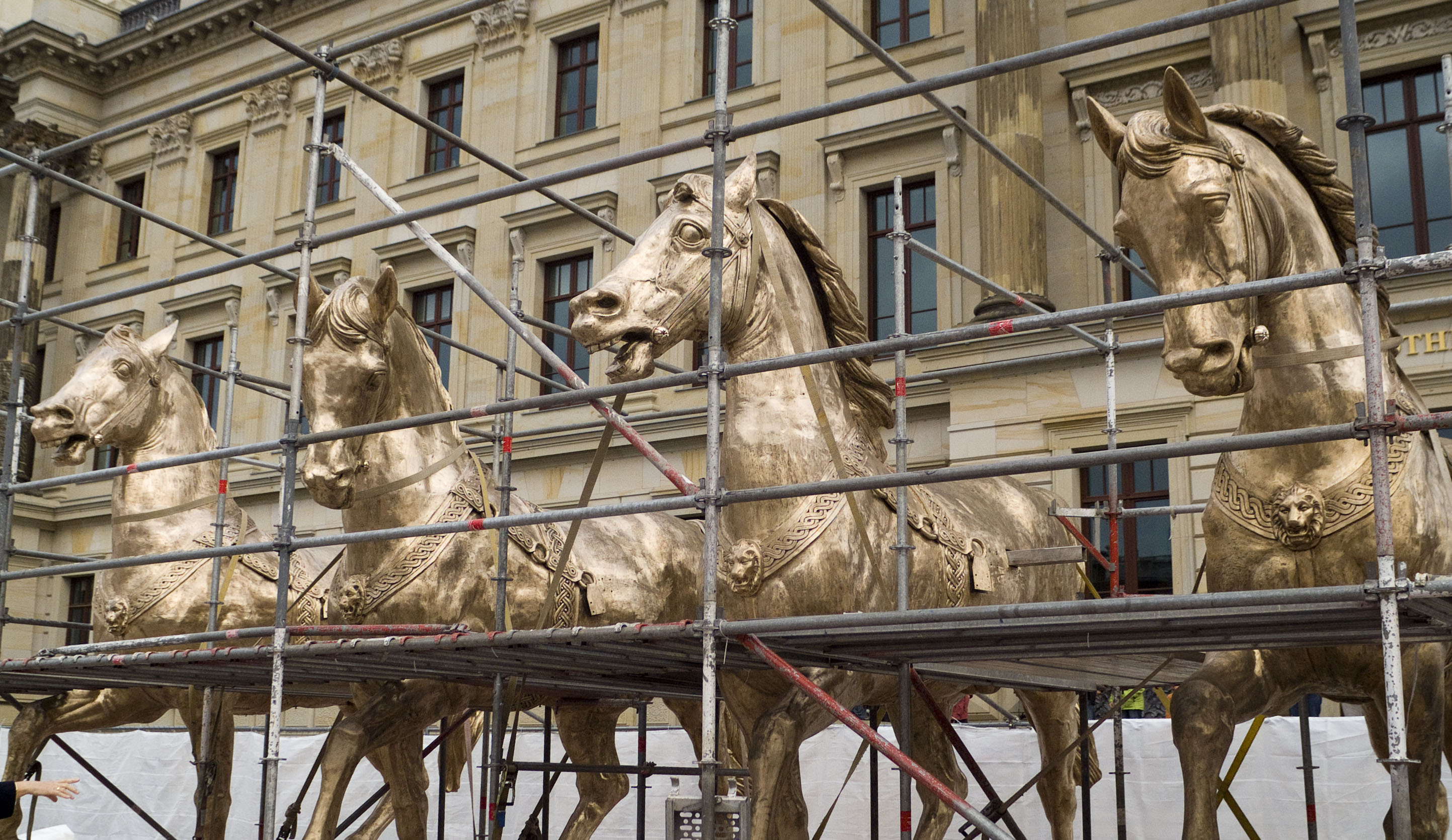 Die vier Pferde der Braunschweiger Quadriga vor der Fassade des wiederaufgebauten Braunschweiger Schlosses, bevor sie auf dessen Dach montiert wurden.